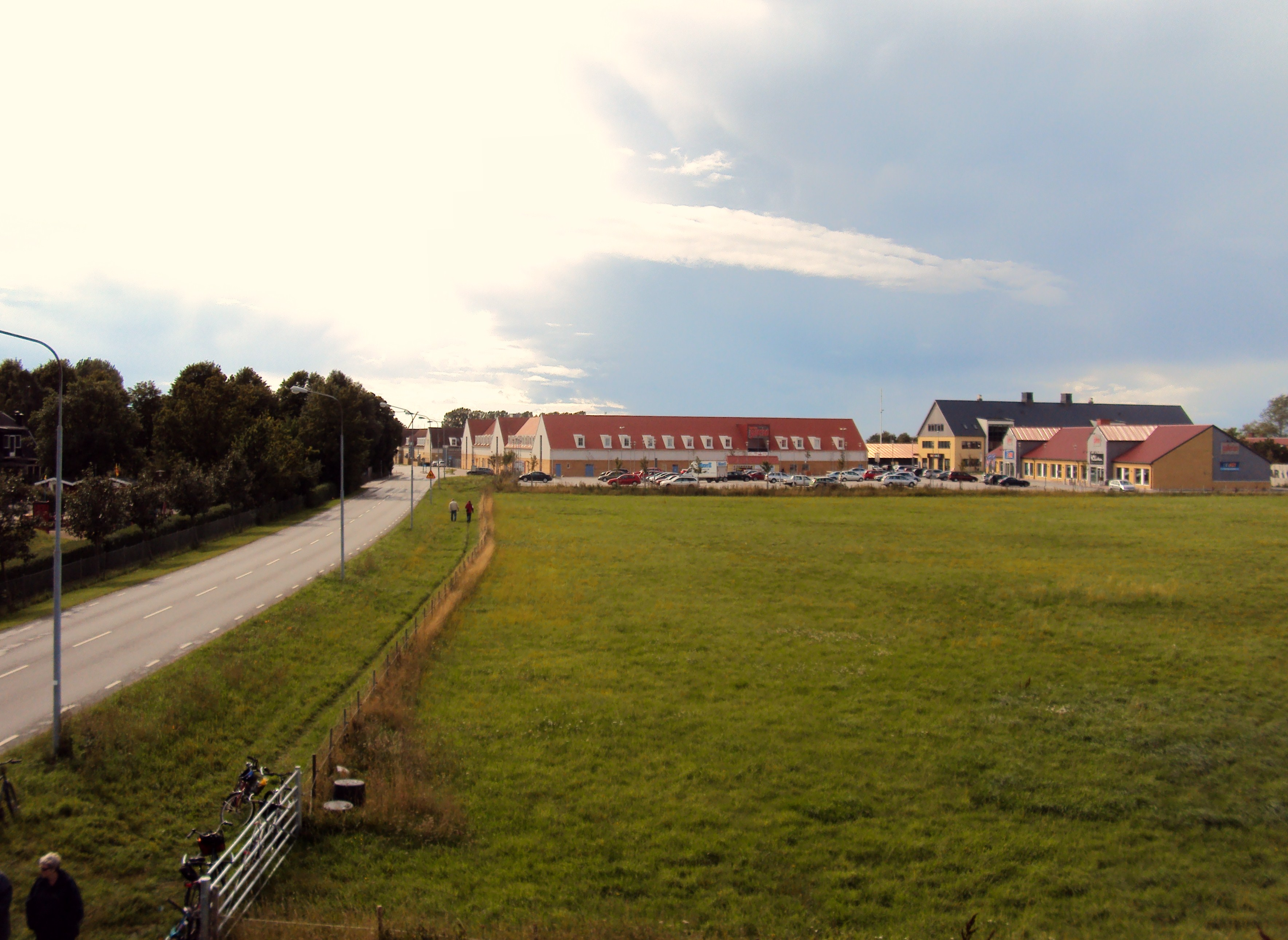 Vy över Toppengallerian från Kungshögen